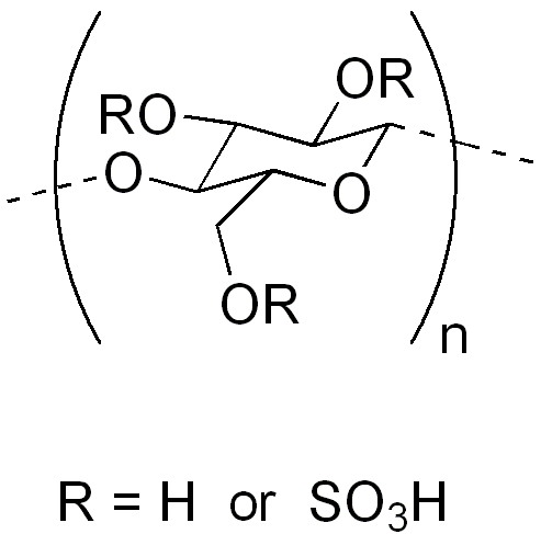 chemical structure of cellulose sulfate